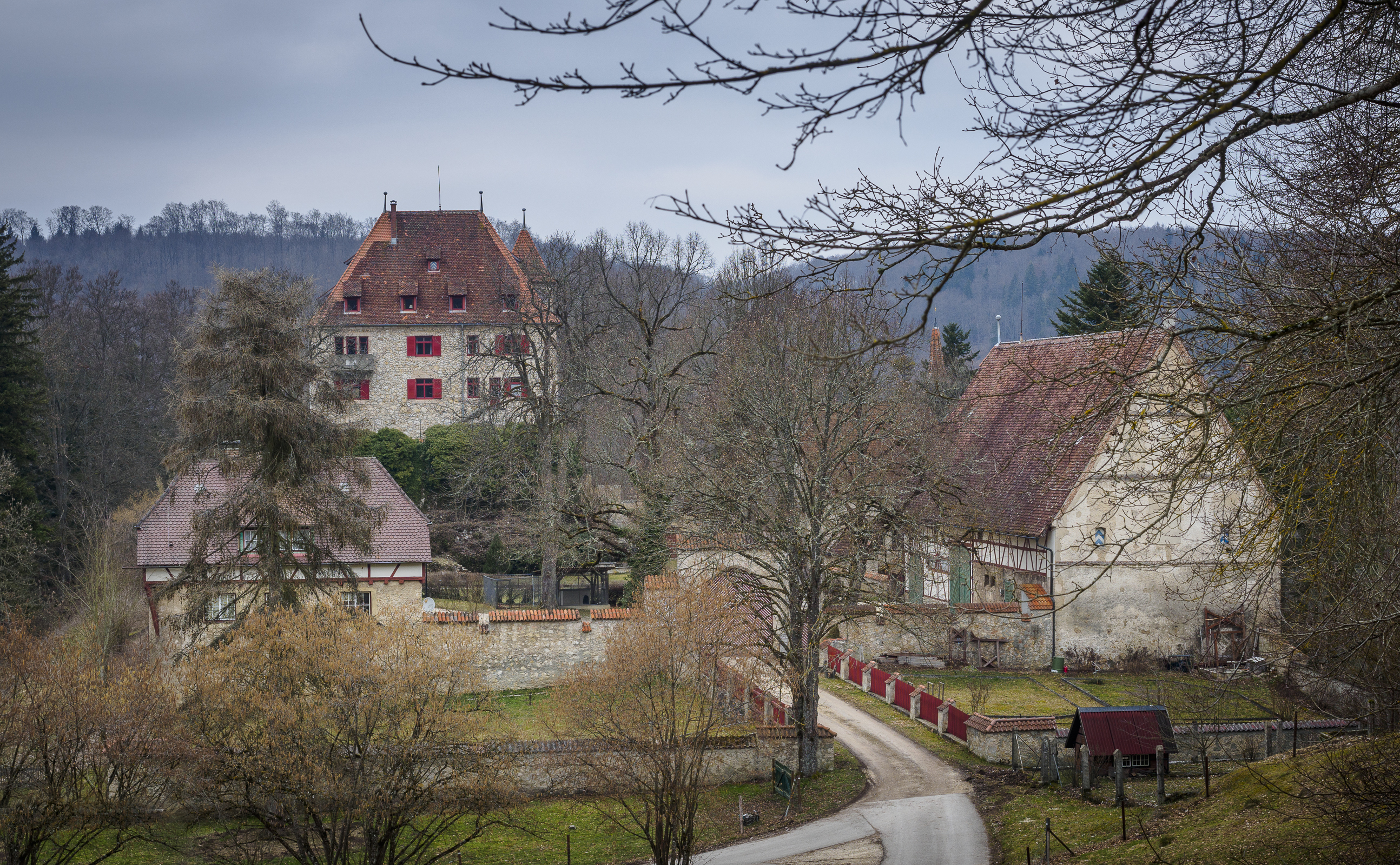 Schloss Neusteußlingen auf der Schwäbischen Alb - Deutschland.